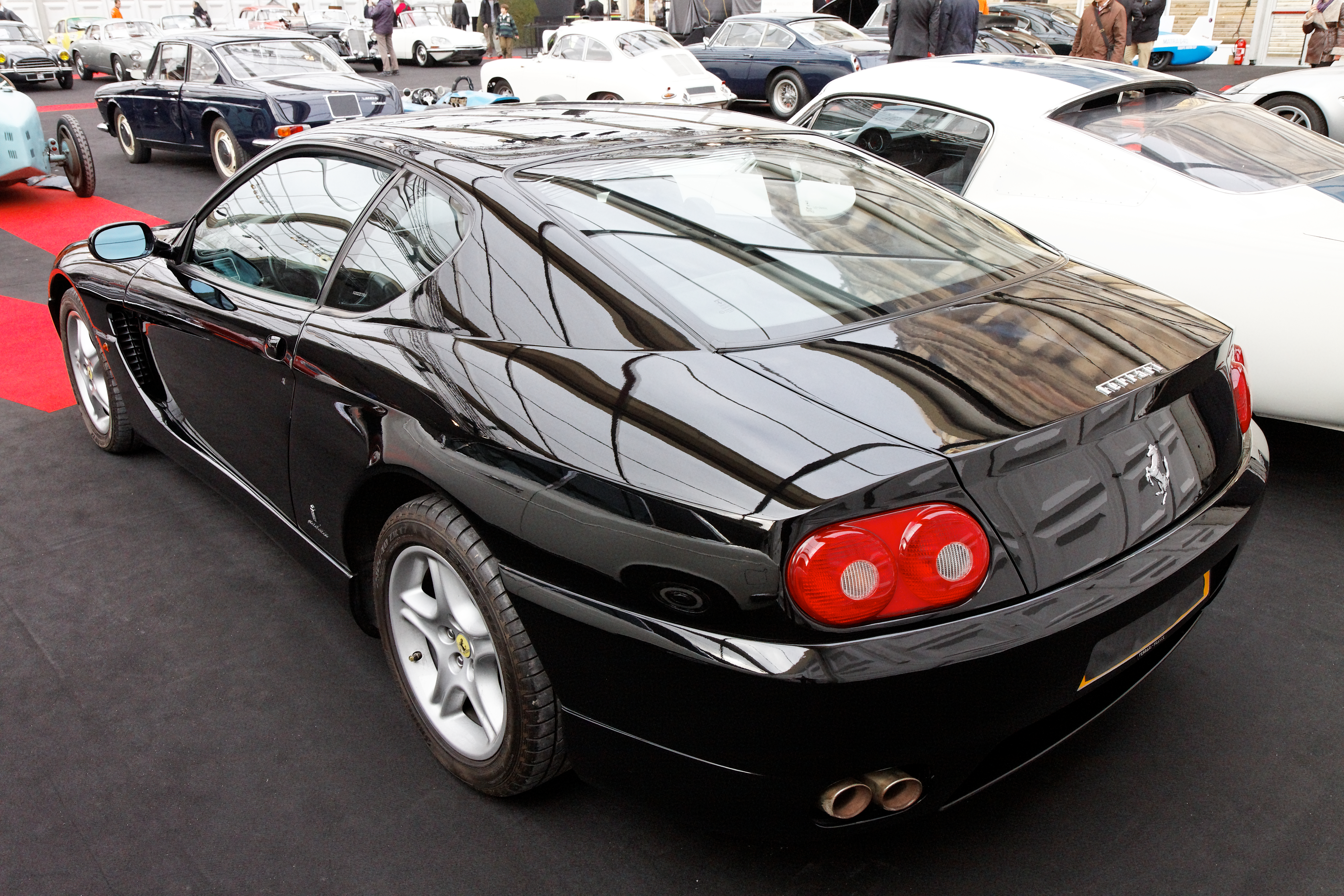 Ferrari 456 - Festival Automobile International 2011 - Vente aux enchères